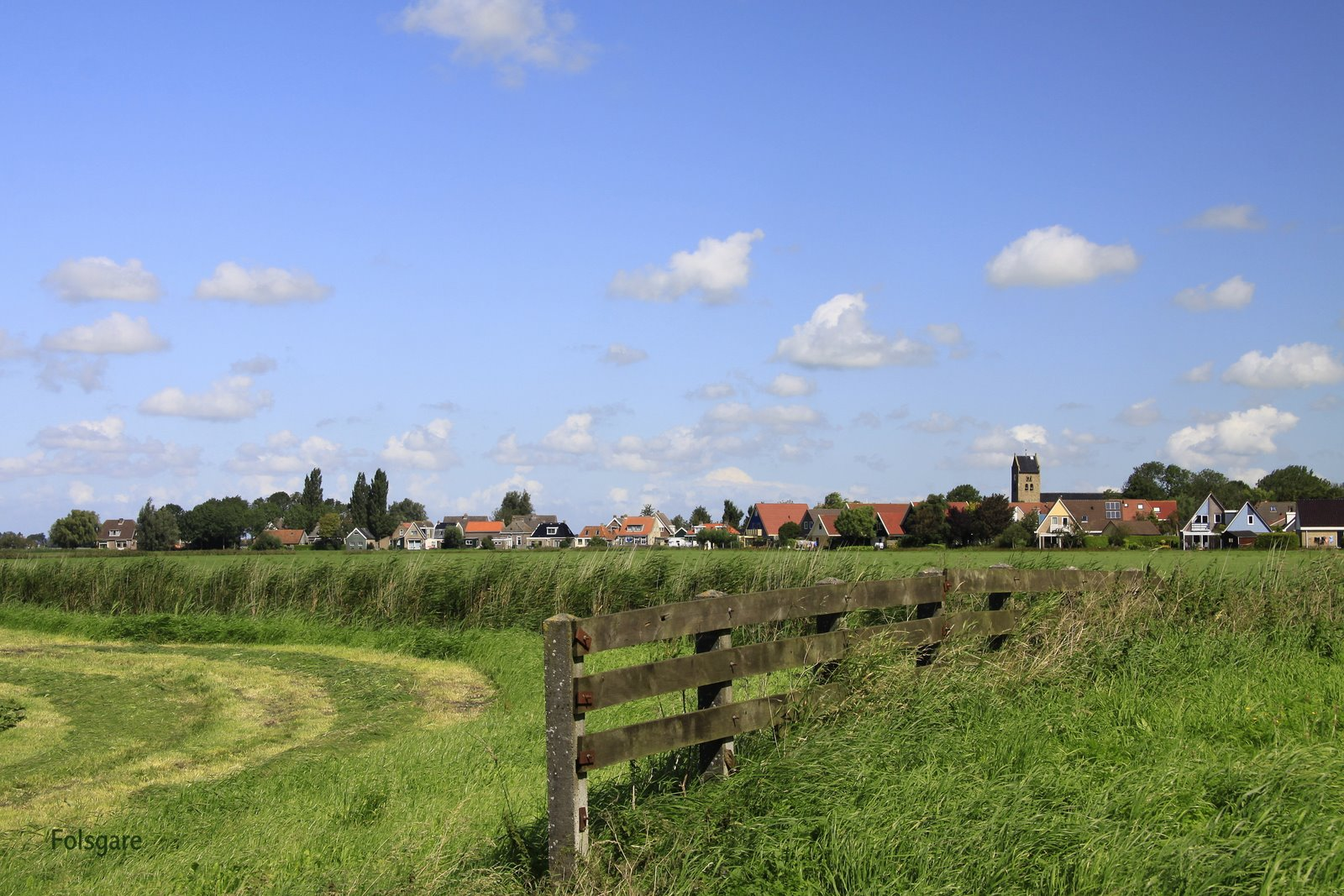 Folsgare prachtig gelegen in het Friese vlakke land. Het kerkje van Folsgare dateert uit 1875.